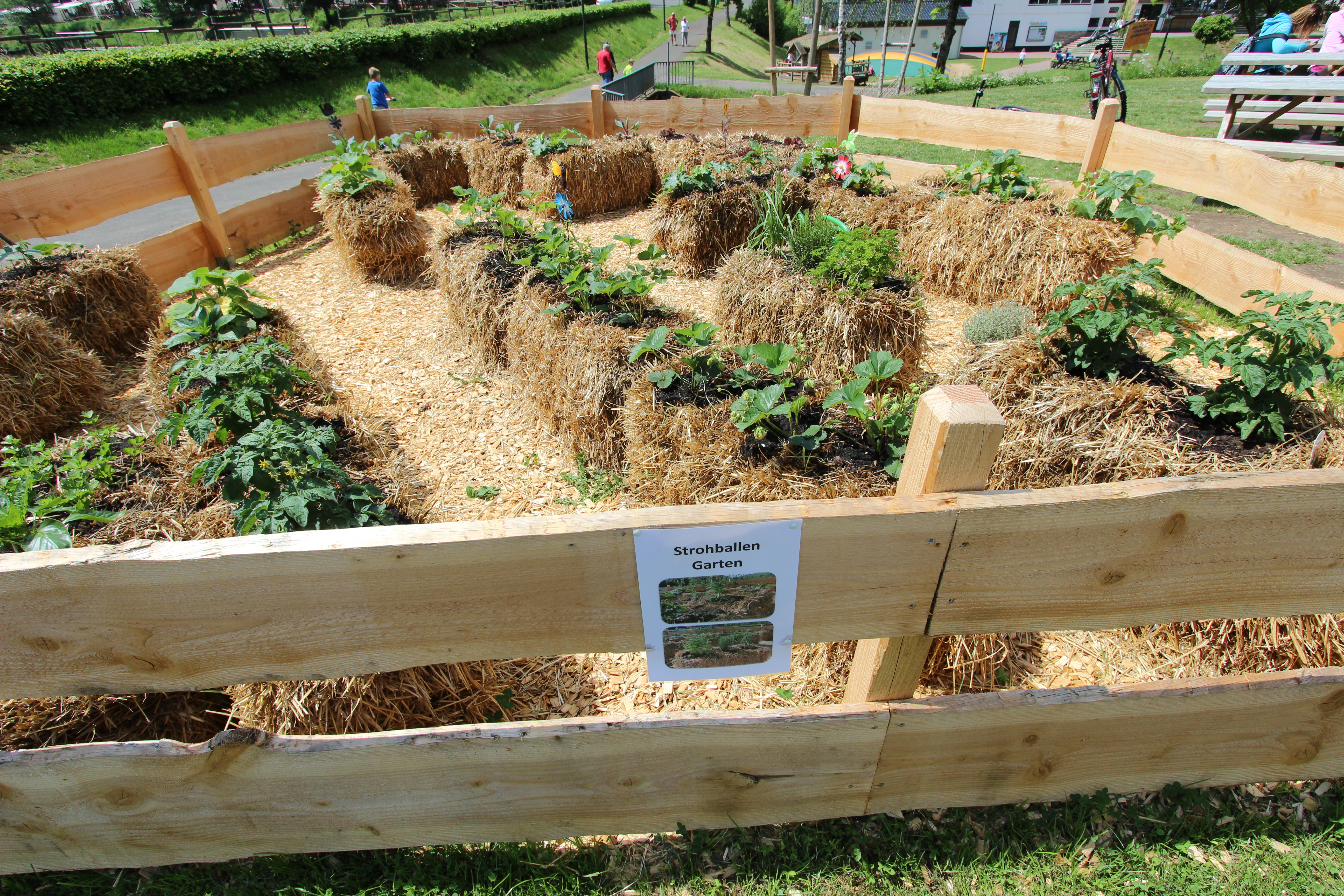 Gartenbeet aus Stroh. Das Garten-Projekt wurde in 54589 Stadtkyll (Eifel) gezeigt. Aufnahme von 2017.